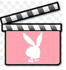 Porno film image